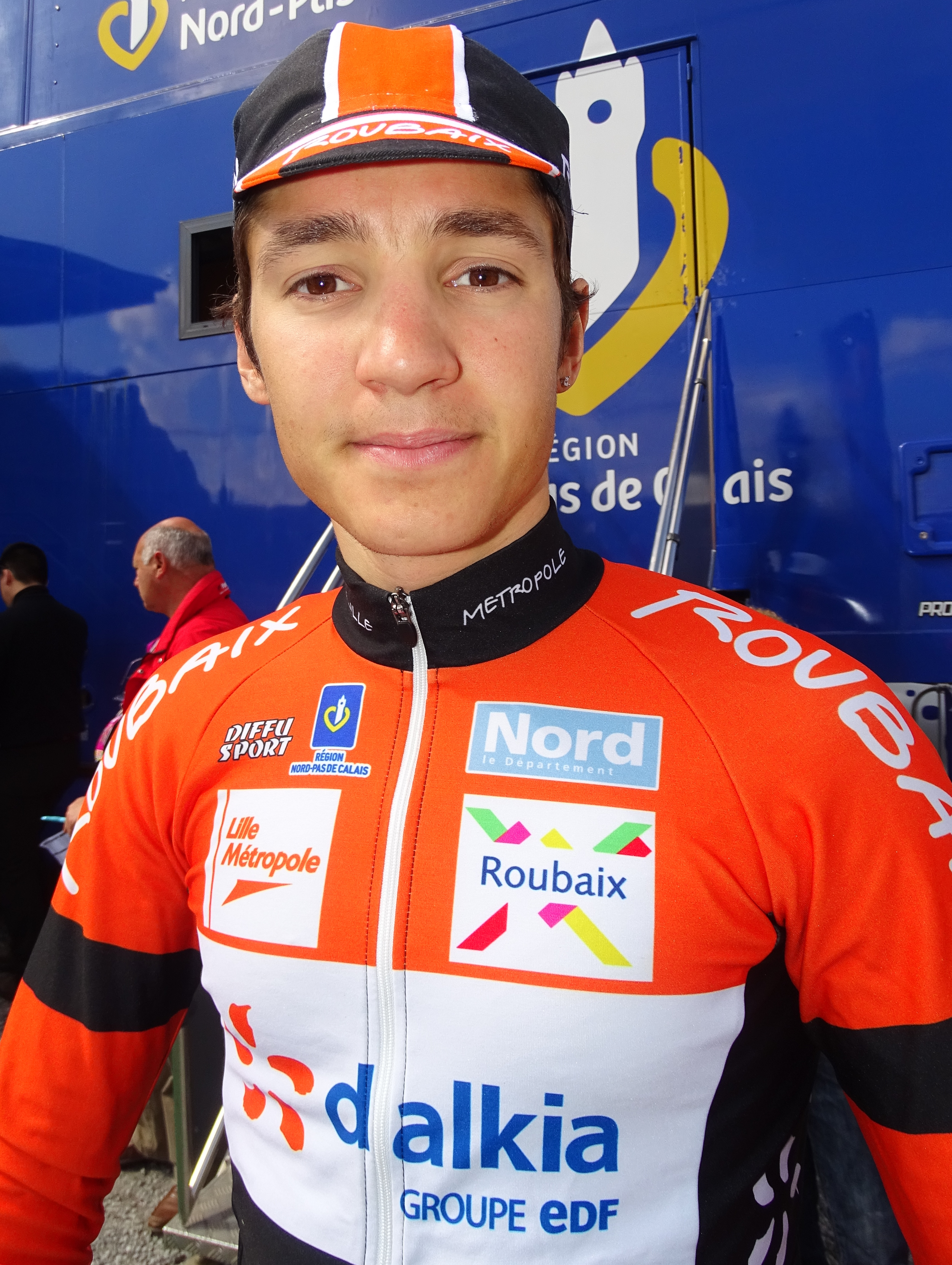 Reportage réalisé le jeudi 7 mai 2015 à l'occasion du départ de la deuxième étape des Quatre jours de Dunkerque 2015 à Fontaine-au-Pire, Nord, Nord-Pas-de-Calais, France. Depicted person: Jimmy Turgis Depicted team: Roubaix Lille Métropole